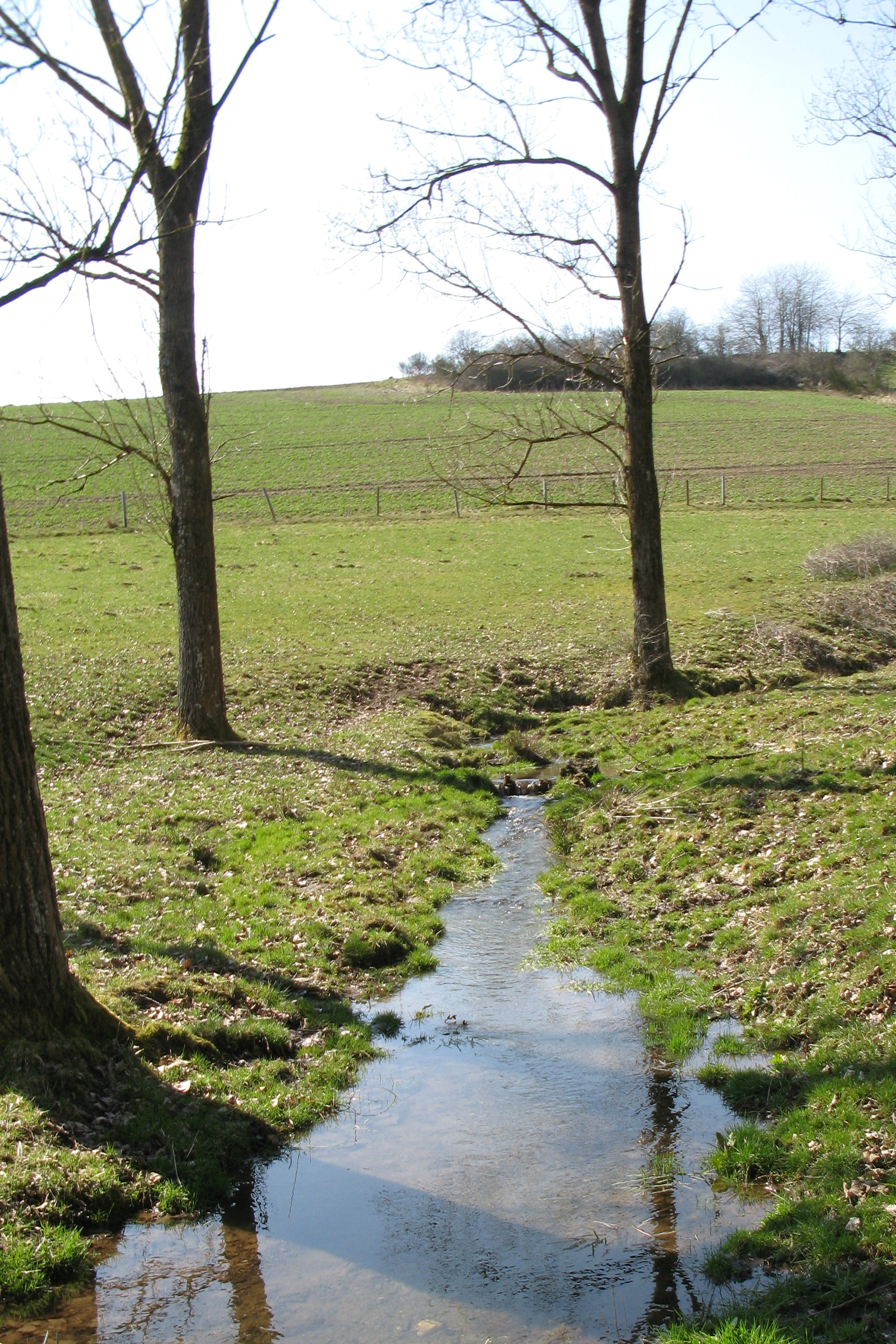 D'Breschterbaach um Flouer Fuurtbierg.